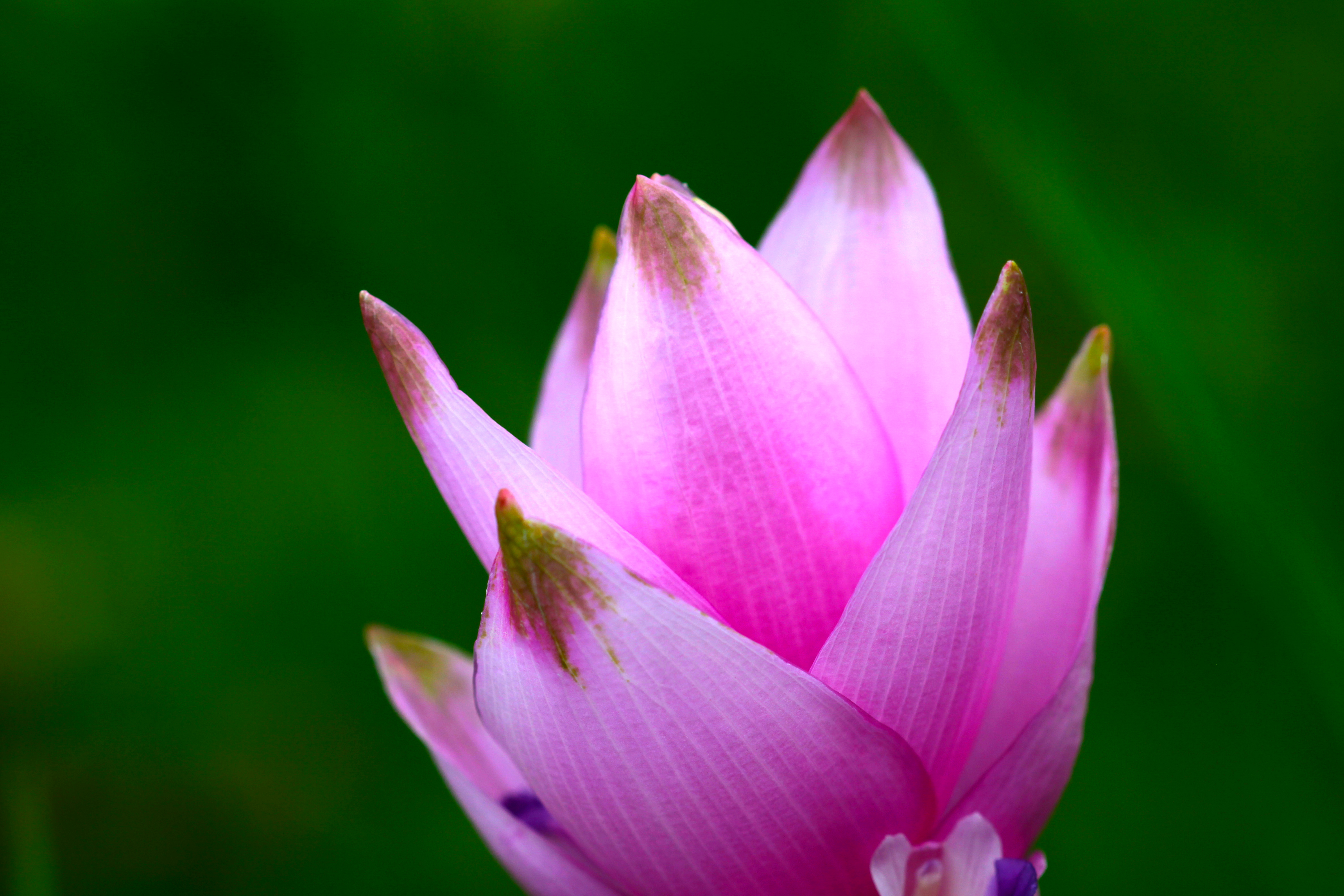 ดอกกระเจียวบานอุทยานแห่งชาติป่าหินงาม